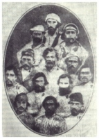 los doce secuaces del Tata Dios